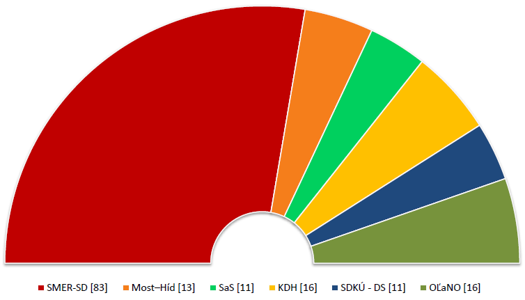 Composition politique du Conseil national de la République slovaque à l'issue des élections législatives de 2012